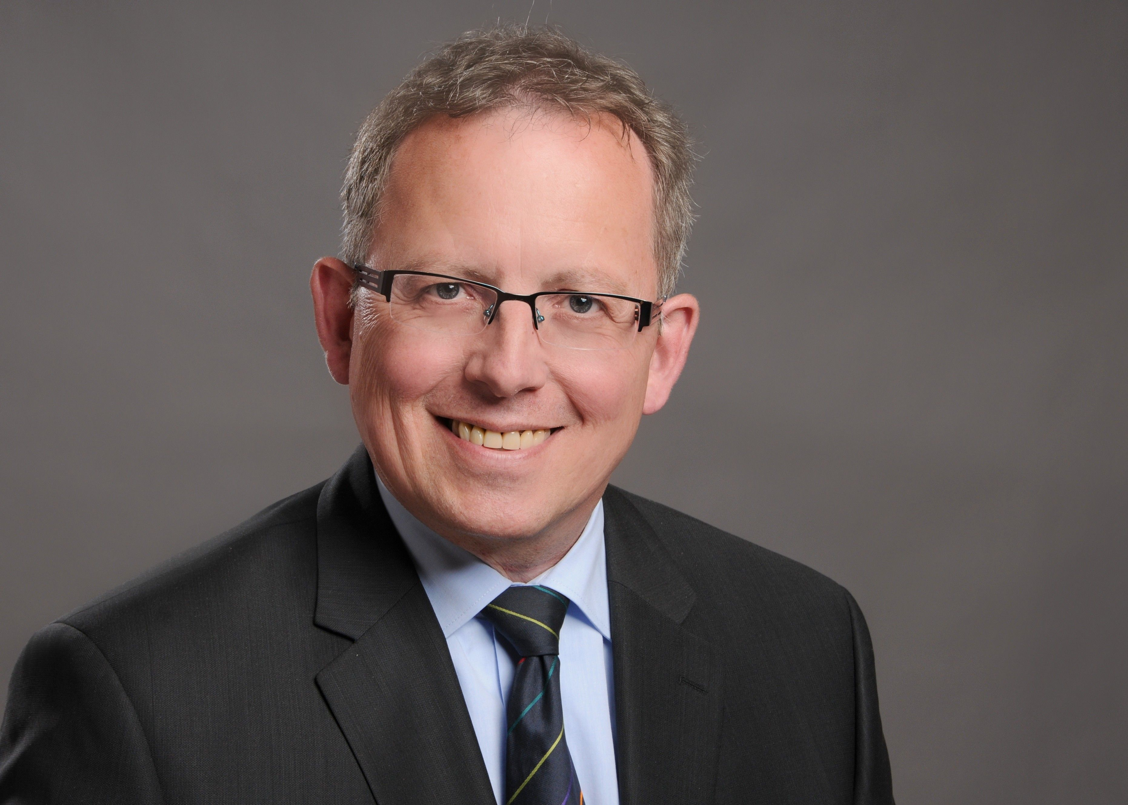 Prof. Dr. Frank Kempken